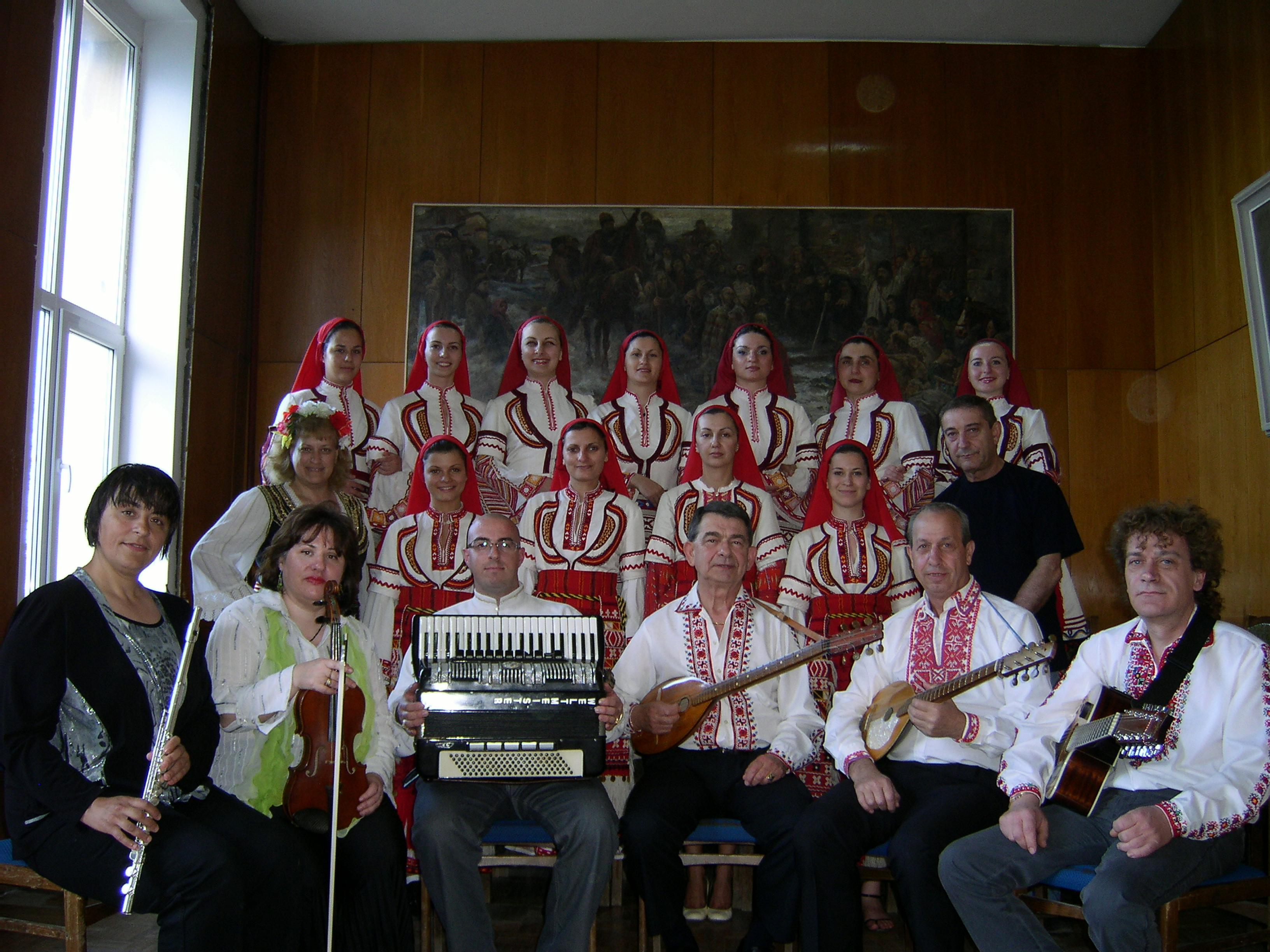 Вокална група и оркестър